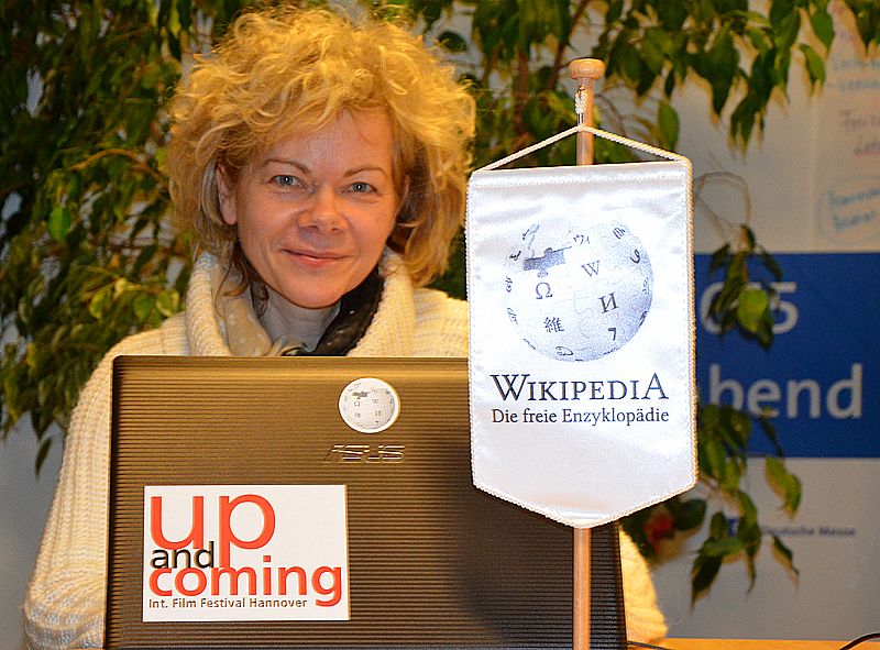 Der die Künstlerin und Ausstellungsmacherin Corinna Luedtke, hier am 24. November 2015 am Rechner im Wikipedia-Büro Hannover ...